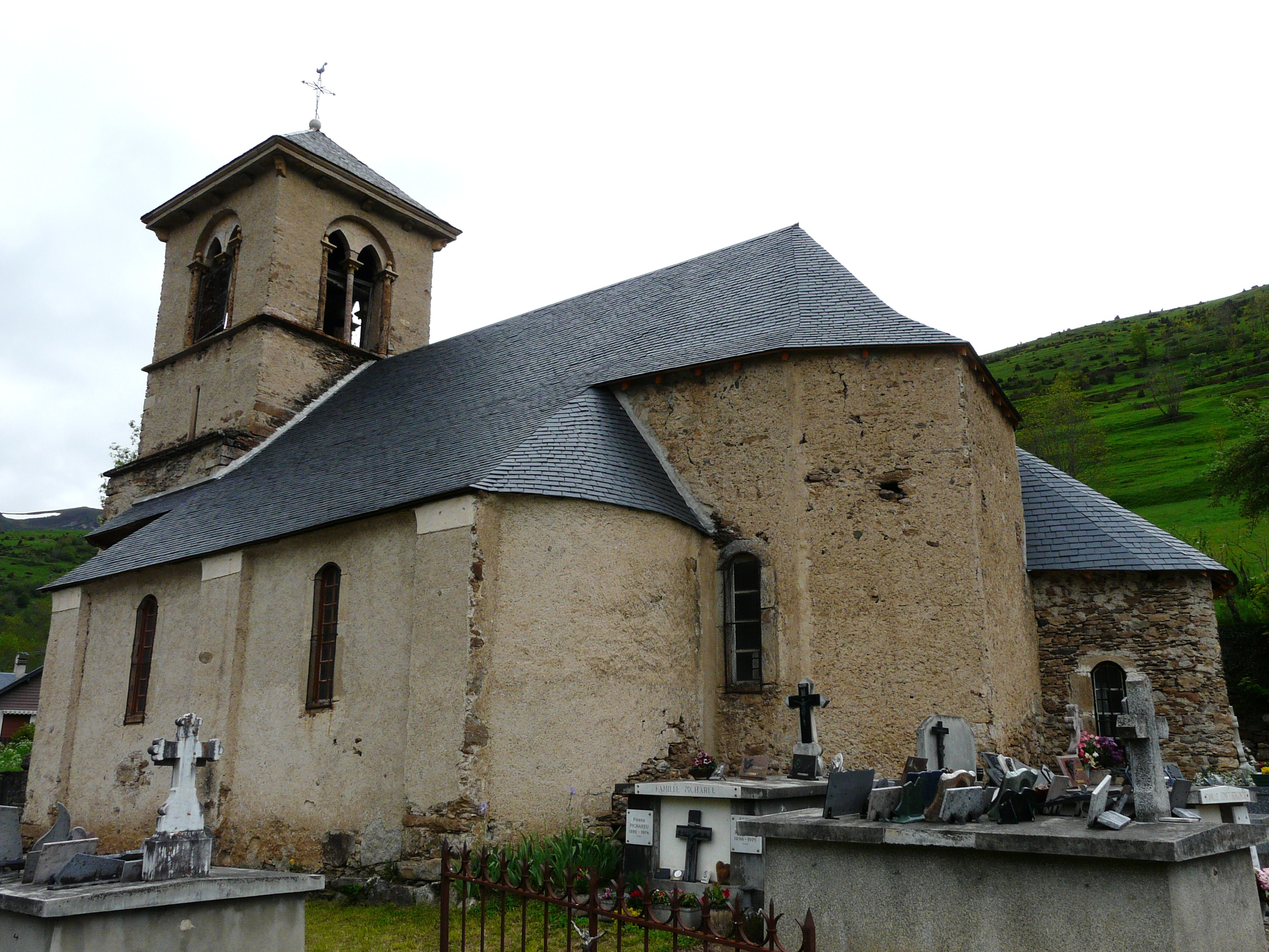 L'église Saint-Christophe de Jurvielle, Haute-Garonne, France.